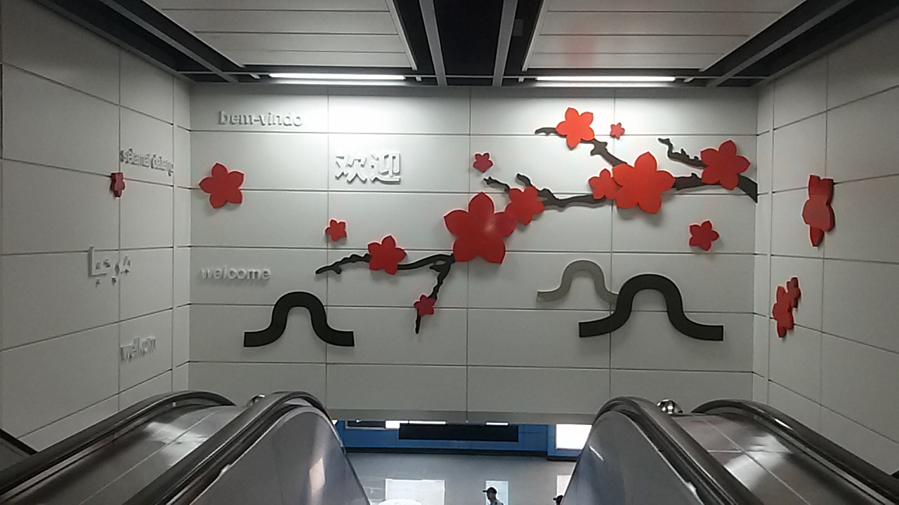 粵語: 喺機場北站A出入口嗰邊嘅文化牆